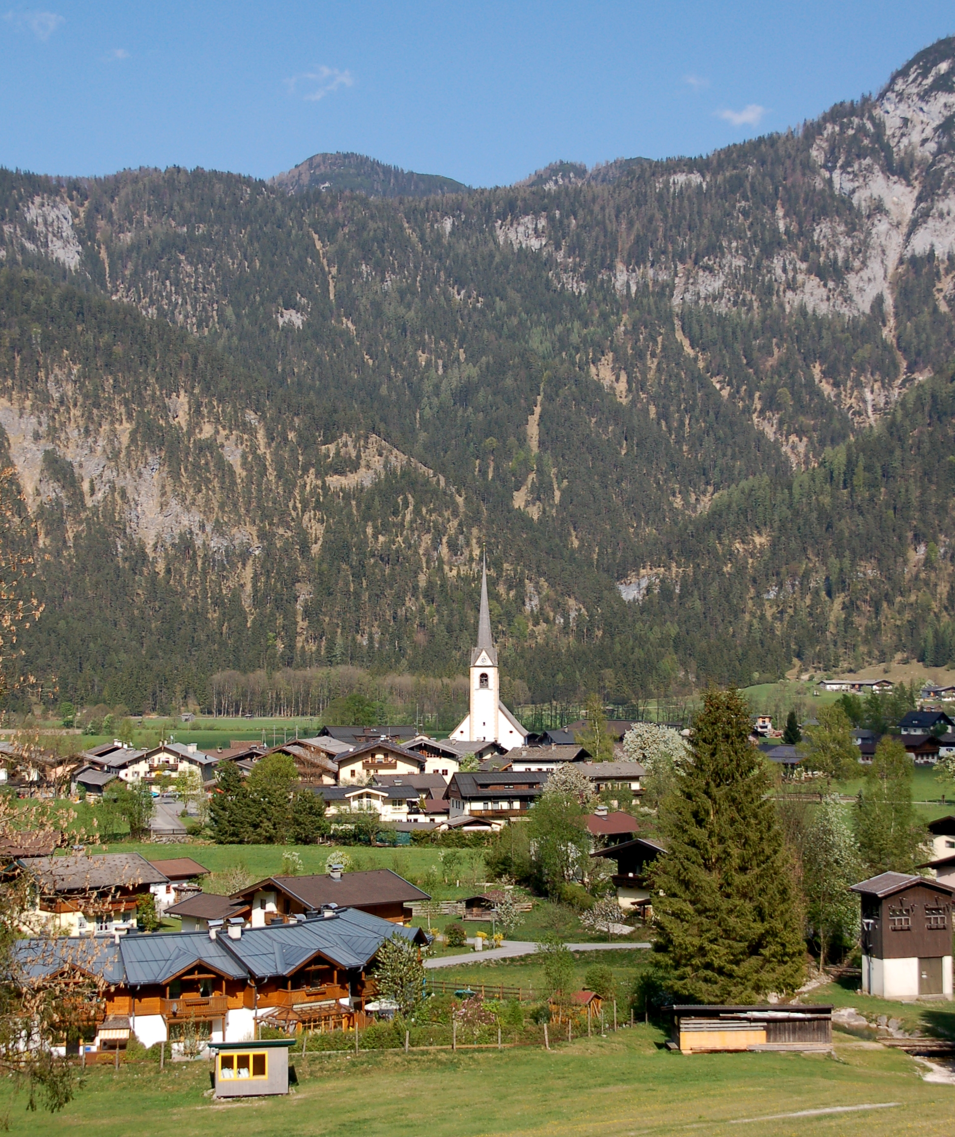 St.Martin bei Lofer